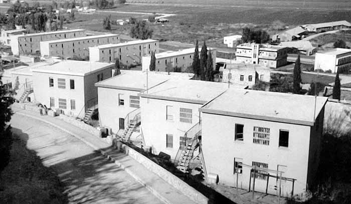 Historical images of Tel Hana תמונות היסטוריות של תל חנן תצפית על תל חנן מרחוב פרץ. הבית הימני רחוב פרץ 47. בתמונה בתי השיכונים שבין רחוב דרך השלום ורחוב הרב בר מוחא של היום. הבית שמימין ל3 הברושים הוא בית הפועל בית מהכפר בלד א'ייח' המבנה שימש גם לארועים משפחתיים. לפניו לכוון צפון מבנה שבו שוכן עד היום בנק לאומי על דרך השלום. מימין מבנה המועצה. מימין לבית מס' 47 רואים את הבית מקיים עד היום מתקופת בלד א שייח' בו שכוכן בית הכנסת על שם אבו חצירא. הבתים ברחוב פרץ אוכלסו בספטמבר 1959. התמונה צולמה כנראה בשנים 1959-1960